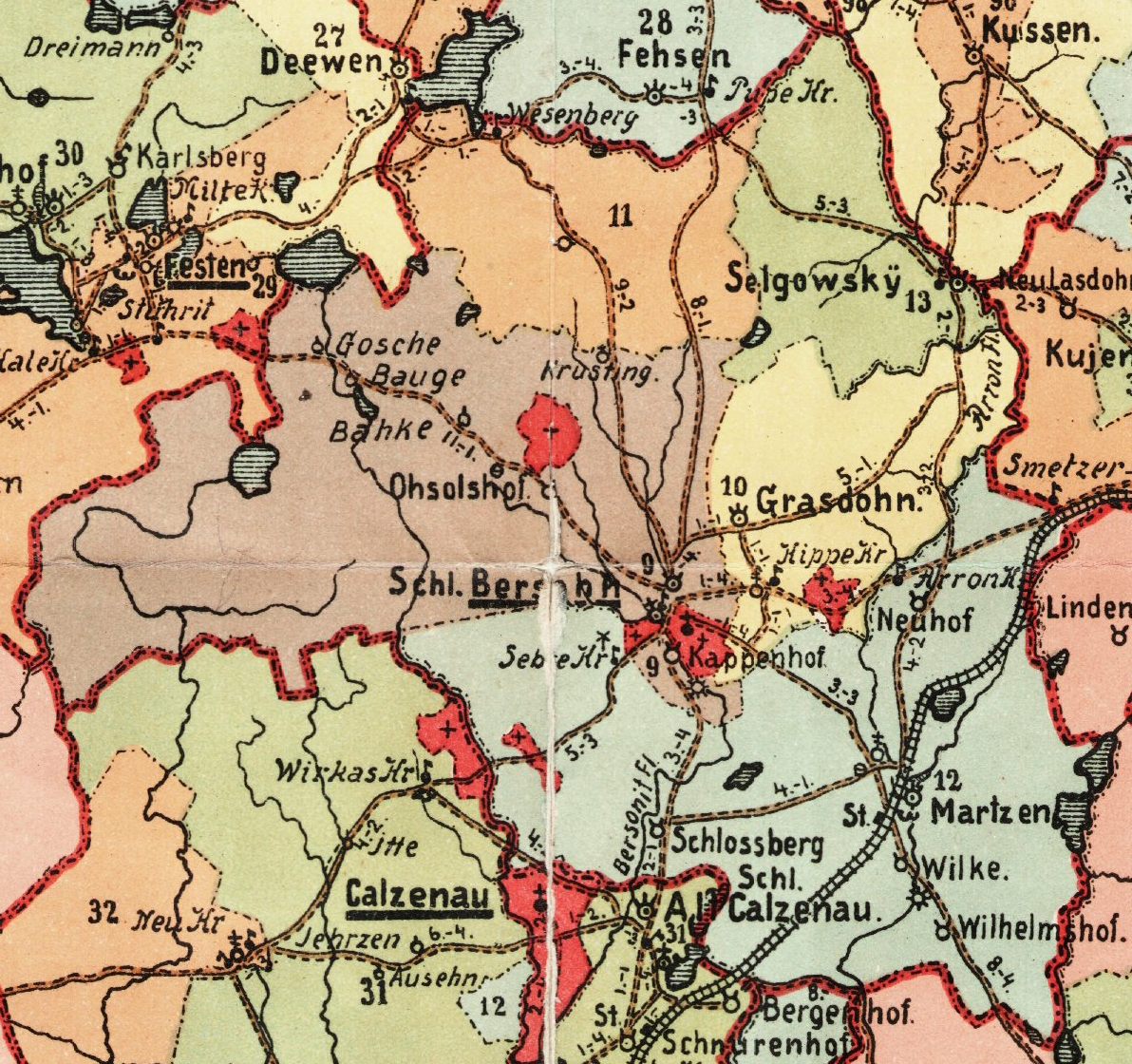 Bērzaune kihelkonna mõisad 1903. aasta kaardil.